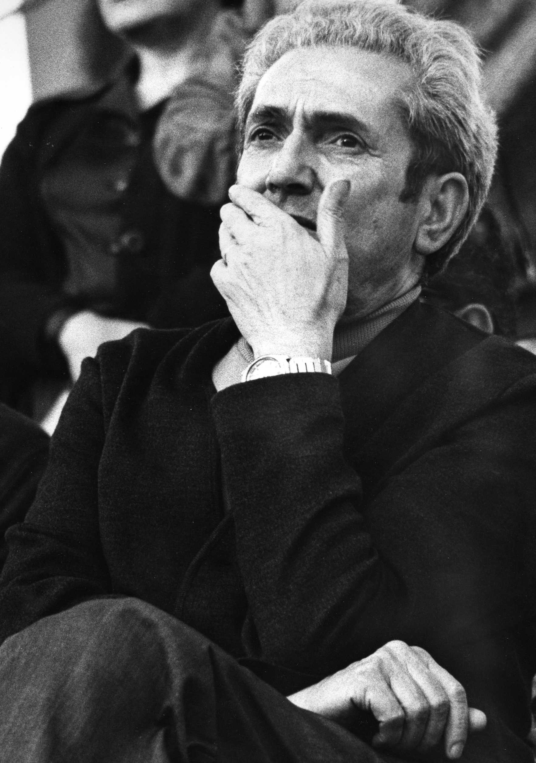 Marcelino Camacho 1978. En la primera fiesta del PCE en la Casa de Campo, tras su legalización